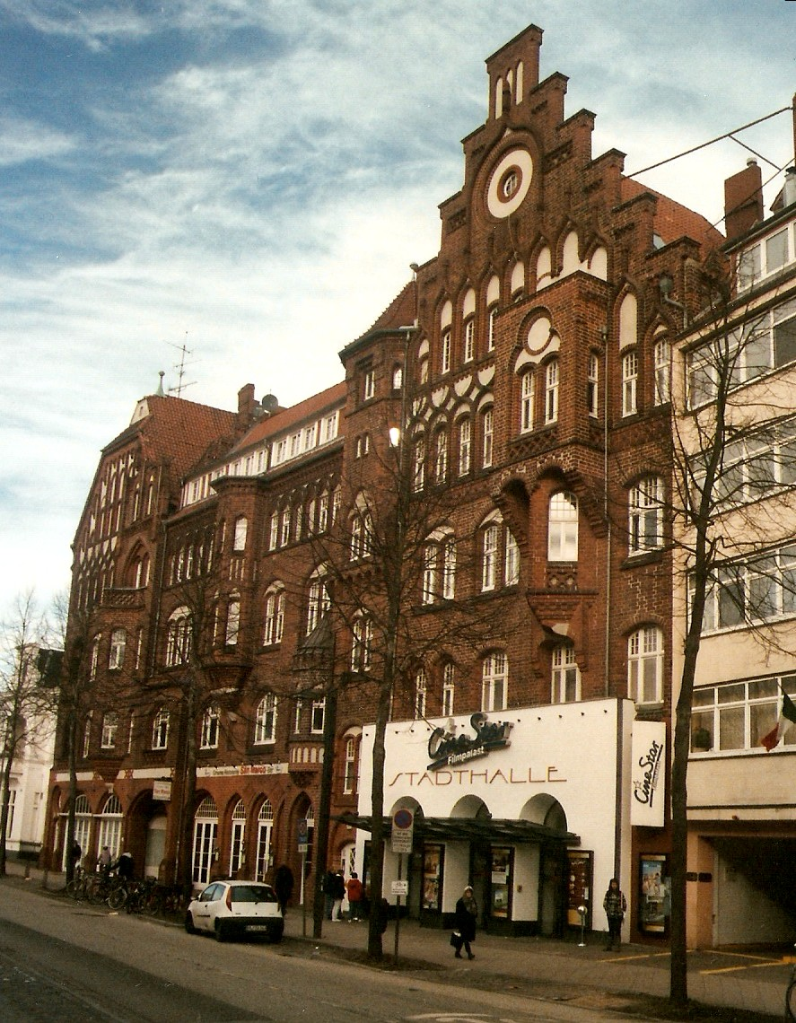 Stadthalle (Straßenansicht)